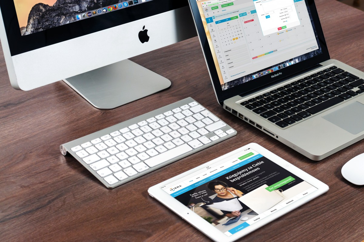 Una MacBook, iMac e iPad de Apple